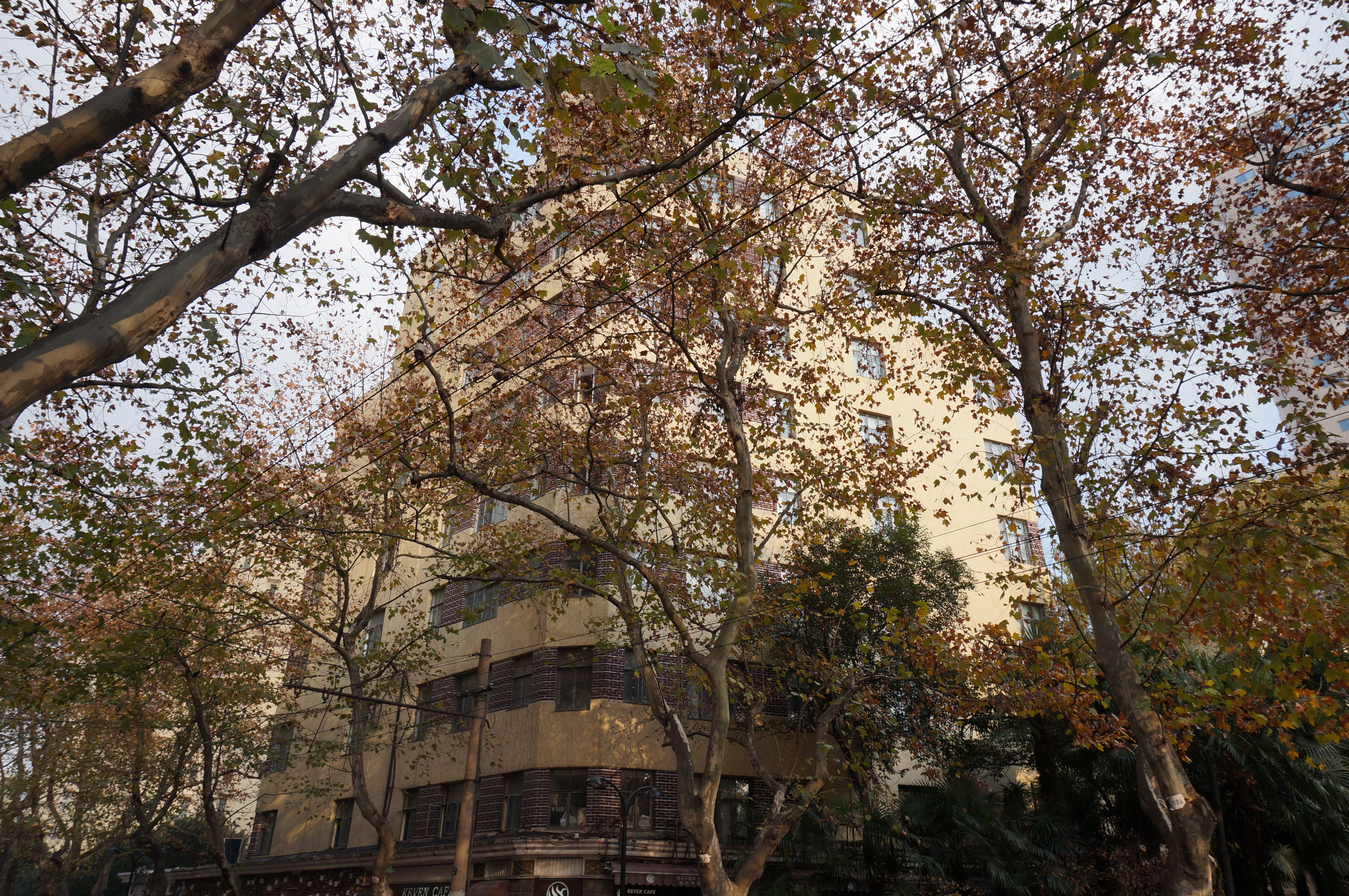 上海凯文公寓